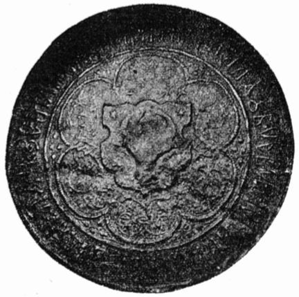 Pecetea lui Constantin Movilă 1608-1611